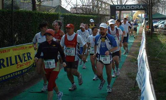 24 ore del Delfino - Partenza.